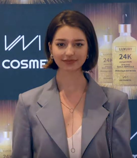 27일 오후 서울시 강남구 삼성동 인터콘티넨탈호텔에서 화장품 브랜드 유니코스메틱의 노블레스 순금골드앰플 론칭쇼와 안젤리나 다닐로바 모델 계약식이 열려 안젤리나 다닐로바가 포토타임을 갖고 있다.